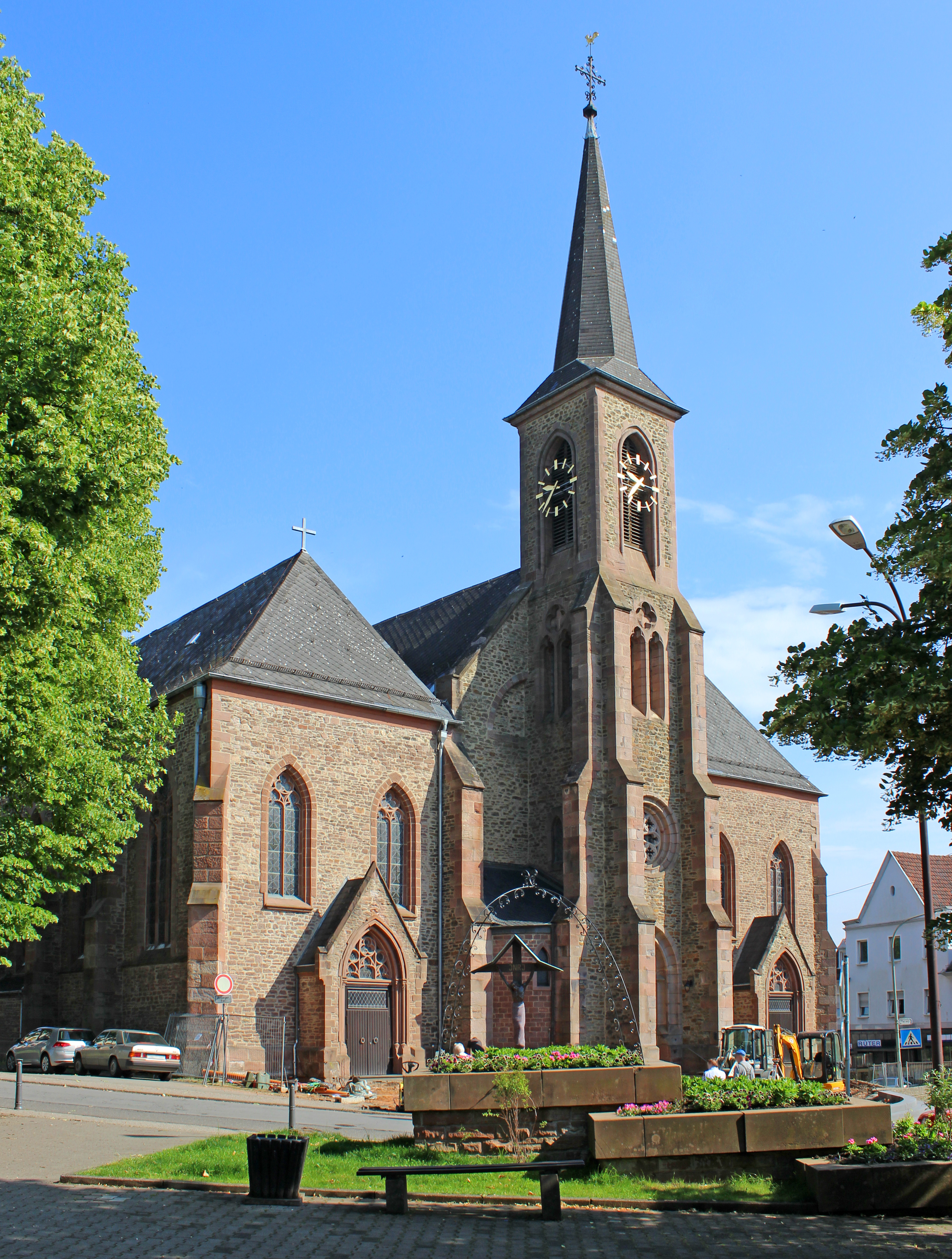 Die katholische Pfarrkirche Mariä Himmelfahrt in Quierschied, Regionalverband Saarbrücken, Saarland